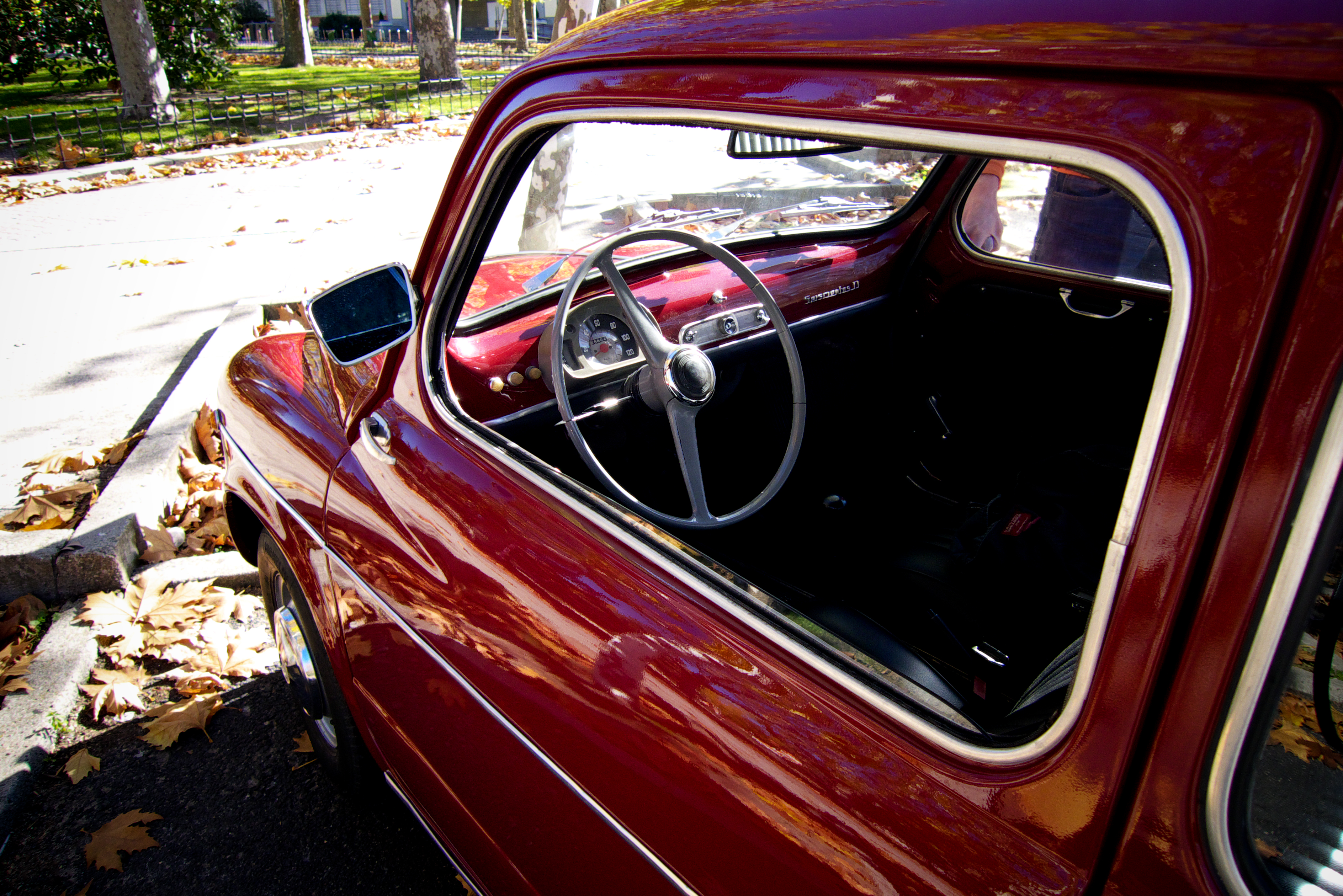 Madrid, Noviembre 2008